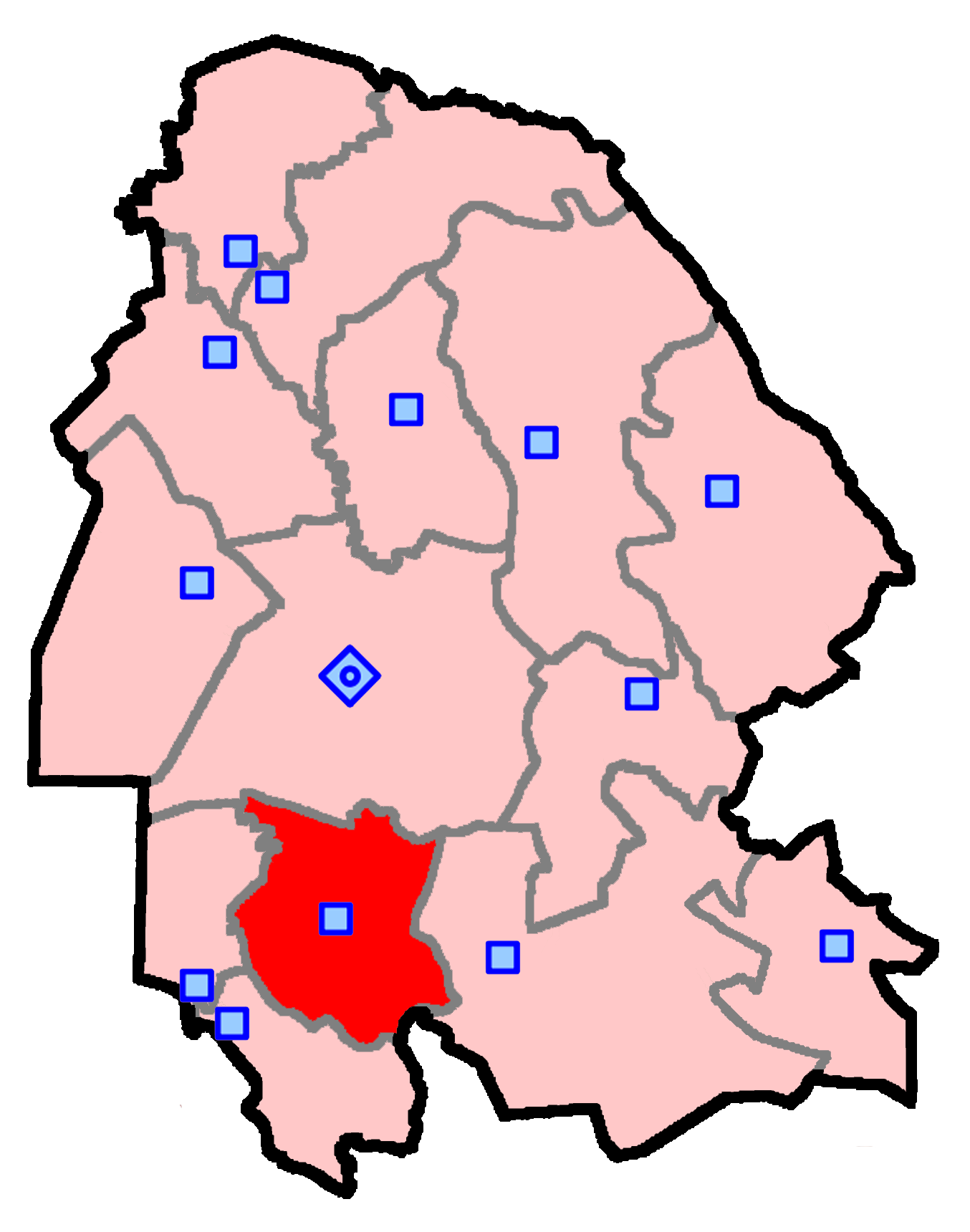 حوزهٔ انتخاباتی شادگان برای انتخابات مجلس شورای اسلامی